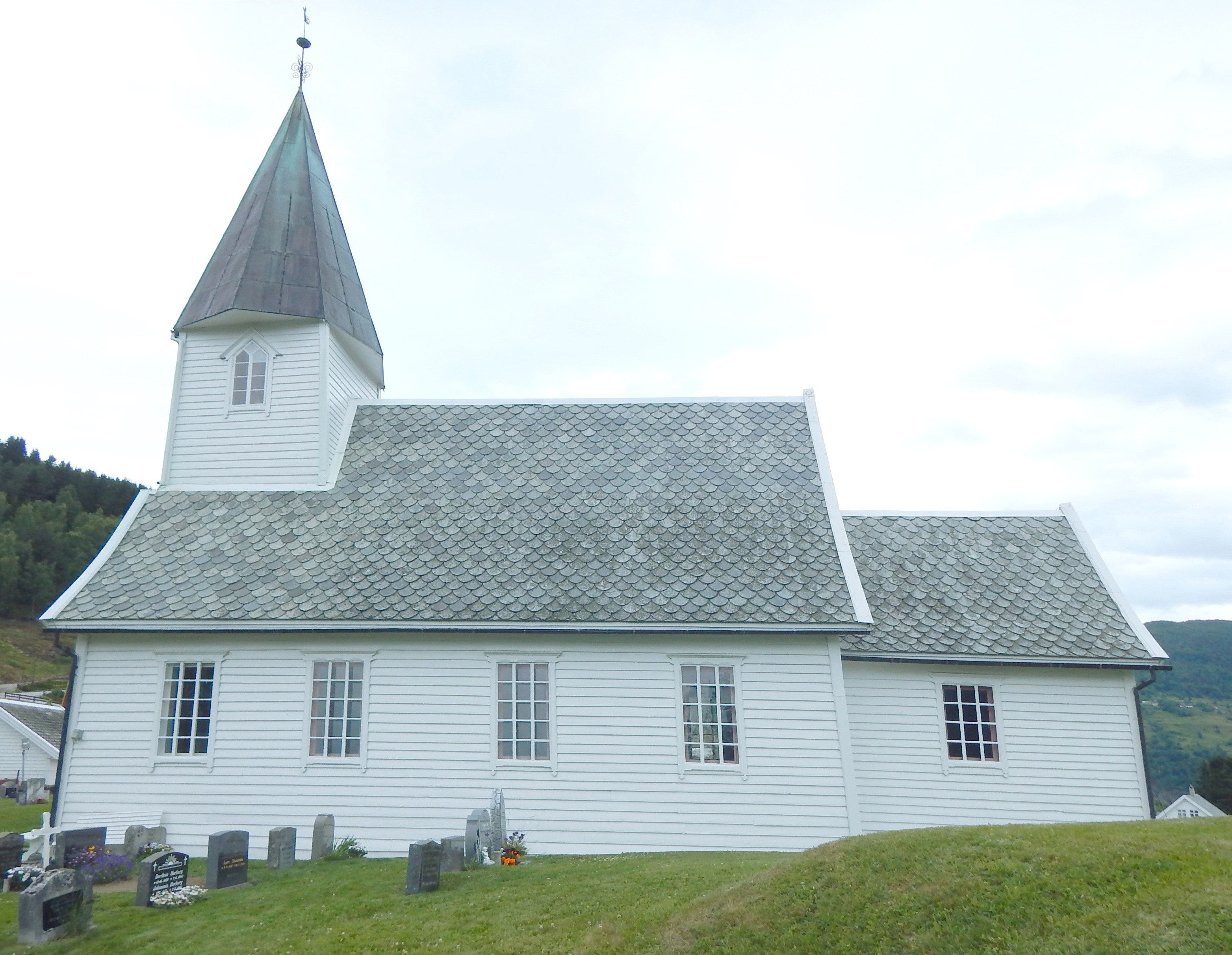 Joranger kirke i Luster